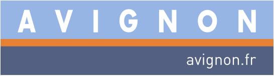 logo officiel de la Ville d'Avignon